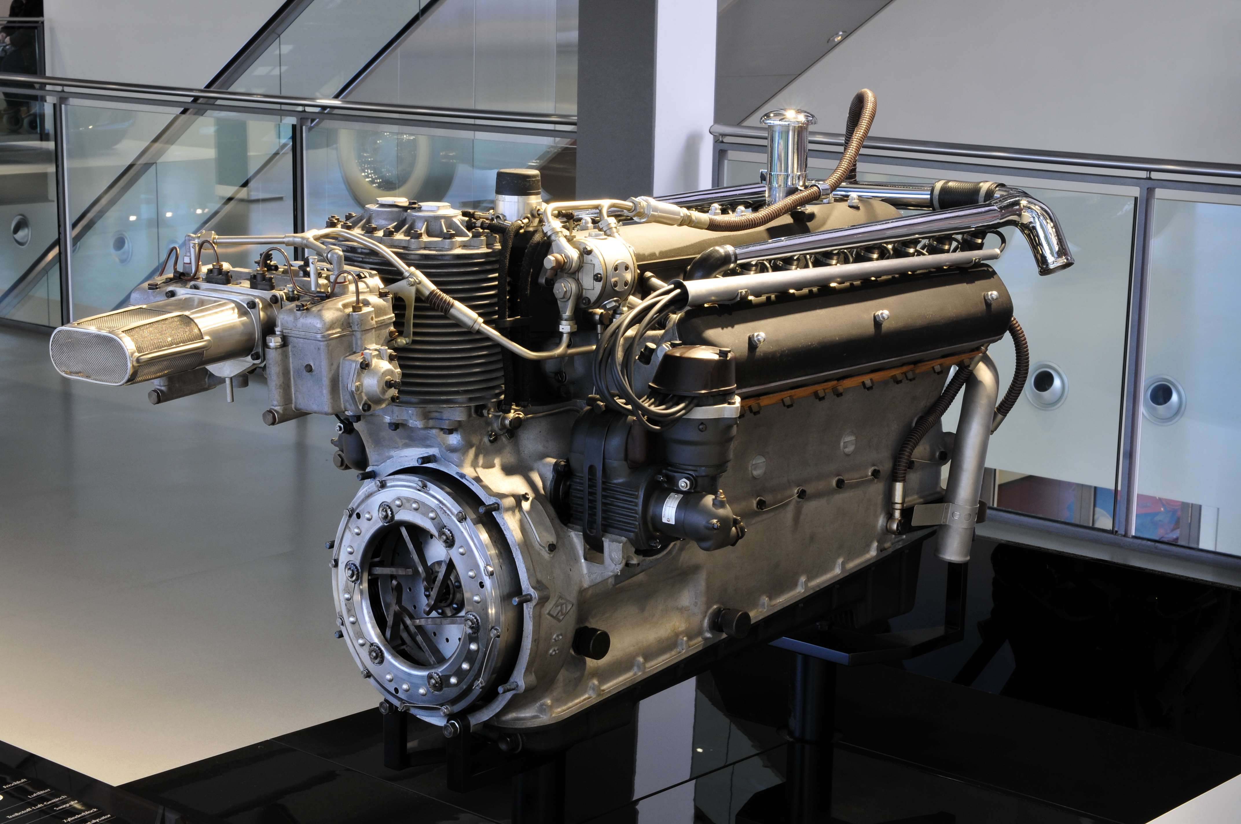 Zeithaus in der Autostadt Wolfsburg